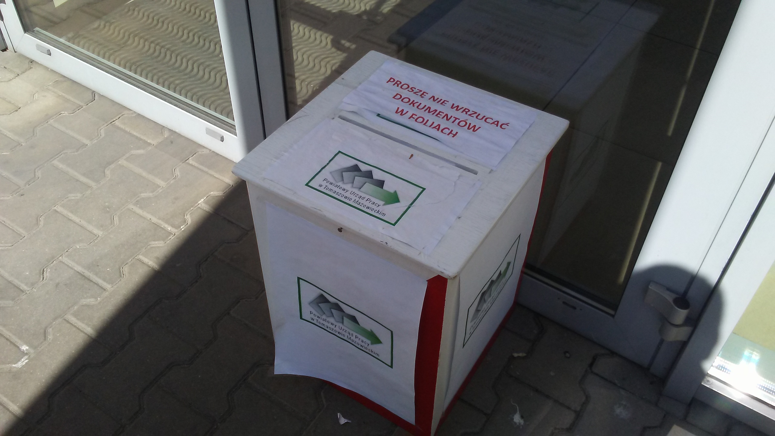 Skrzynka podawcza urzędu pracy na zewnatrz budynku. Tomaszów Mazowiecki w województwie łódzkim.